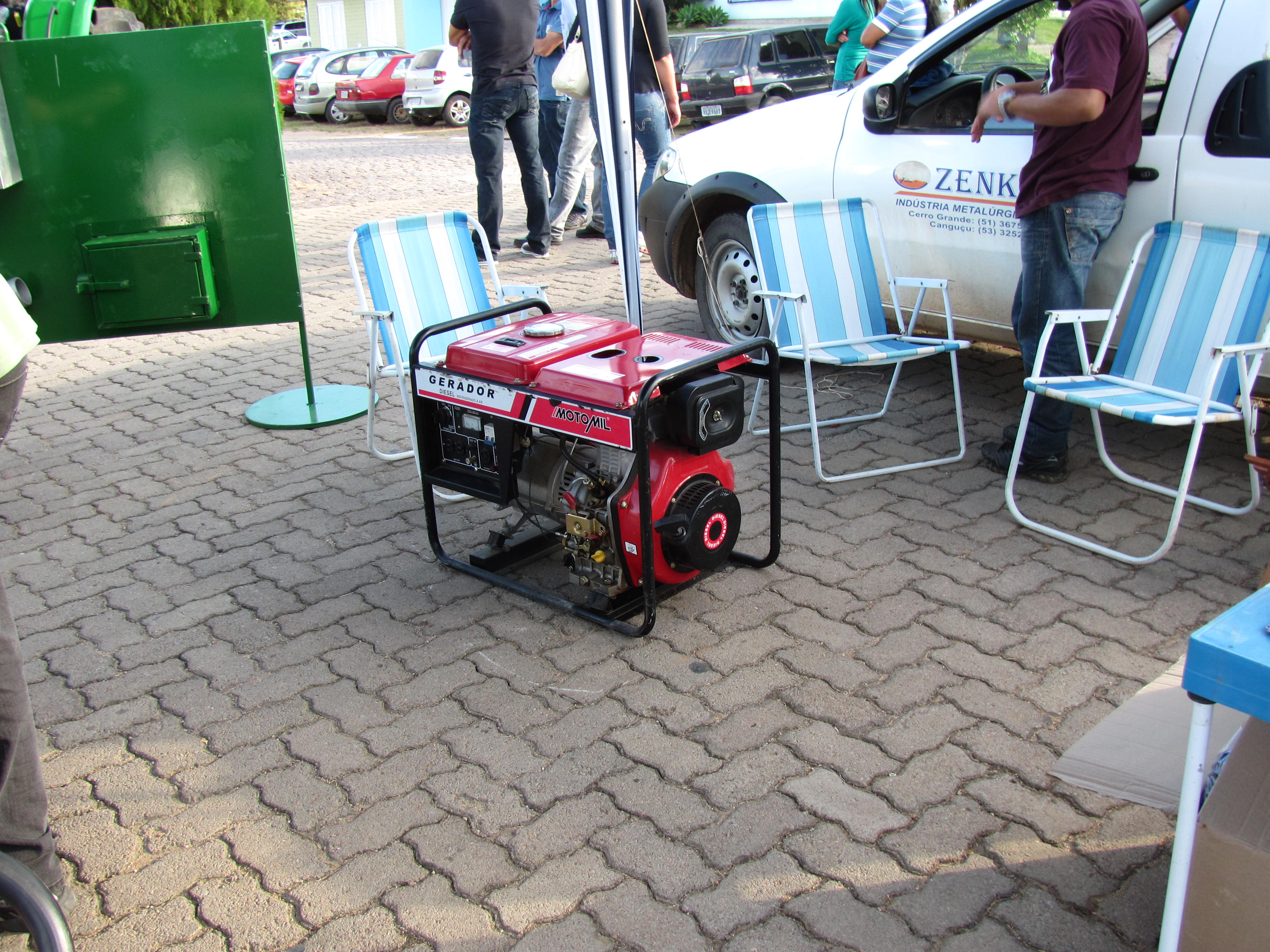 Gerador Diesel, complemento para o Forno elétrico para estufa de fumo